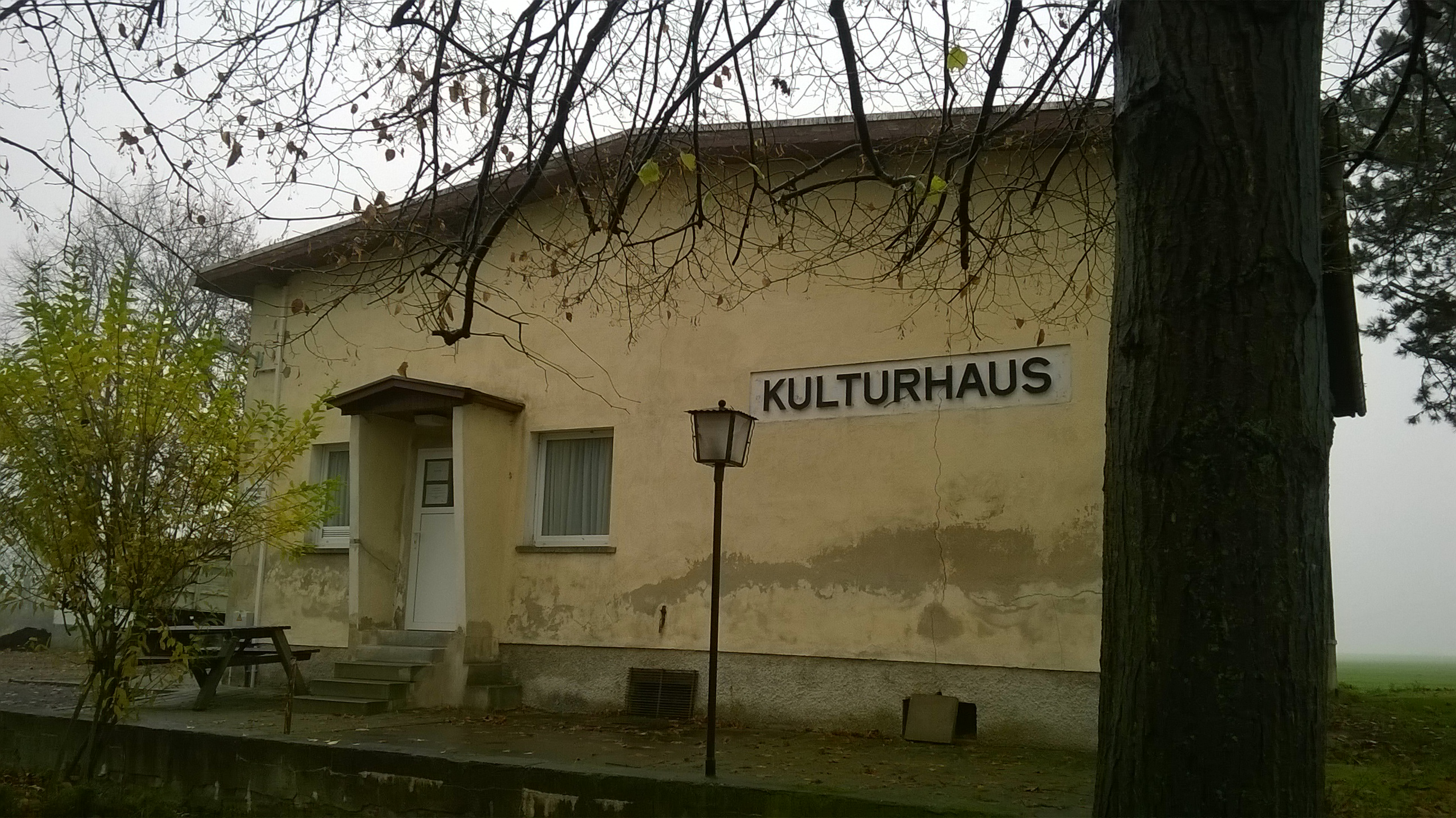 Kulturhaus in 04626 Drogen (Thür.)